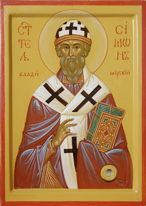 Икона. Святитель Симон Владимирский и Суздальский, Закарпатье, Мукачево, 2014